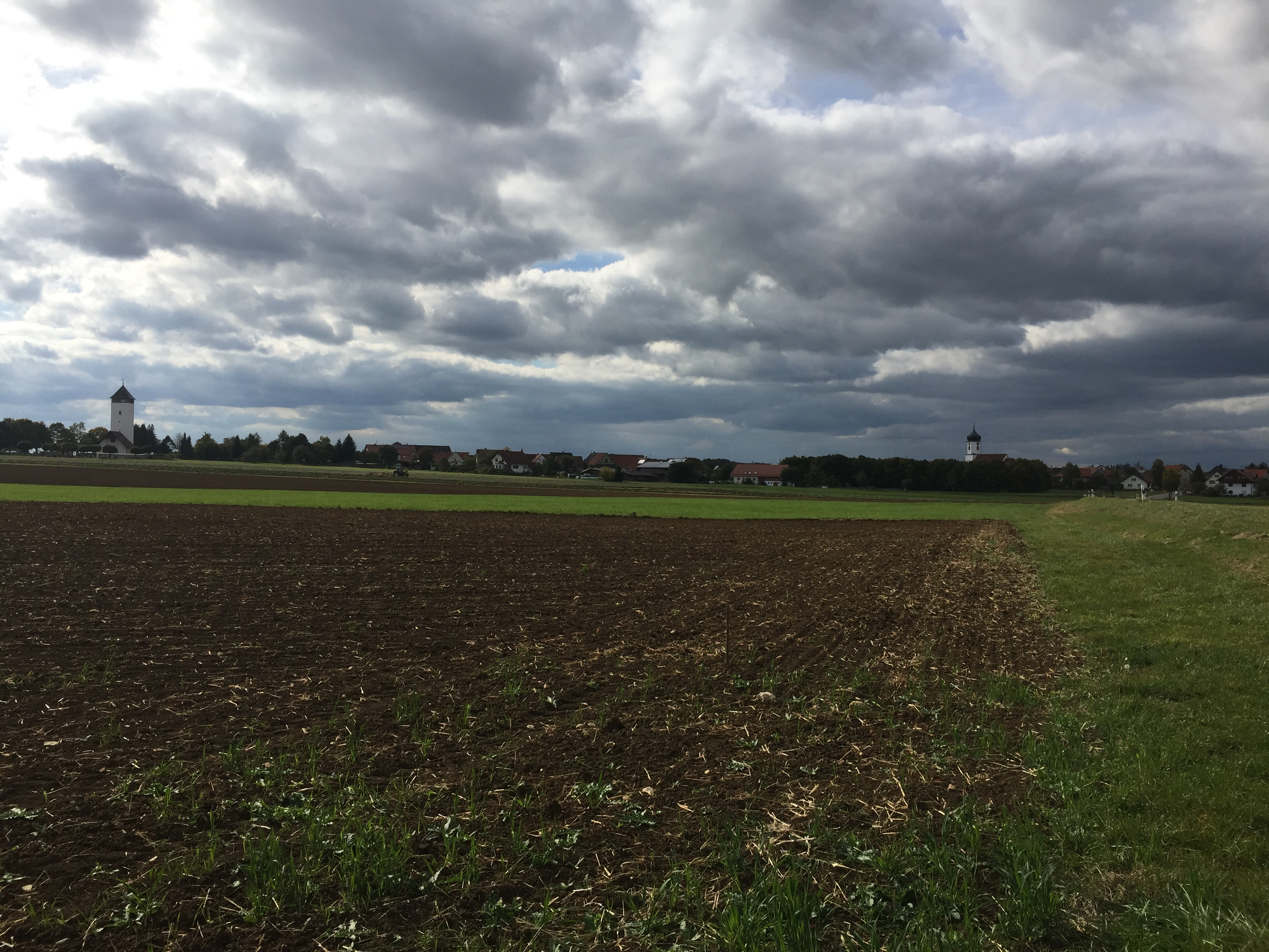 Pfarrkirche St. Stephanus in Buchheim, Landkreis Tuttlingen.